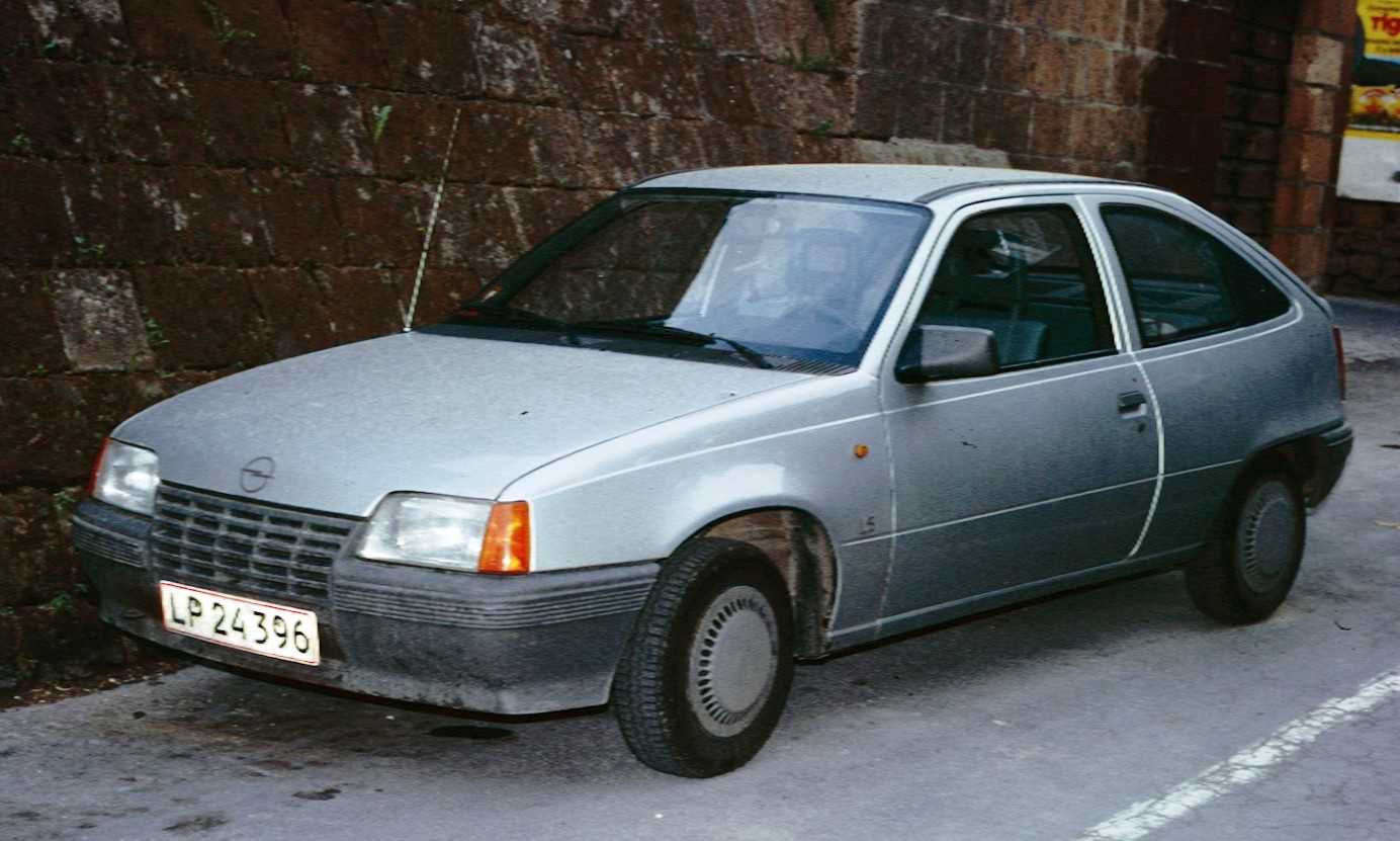 Opel Kadett 2 door in Denmark (see reg. nummer)